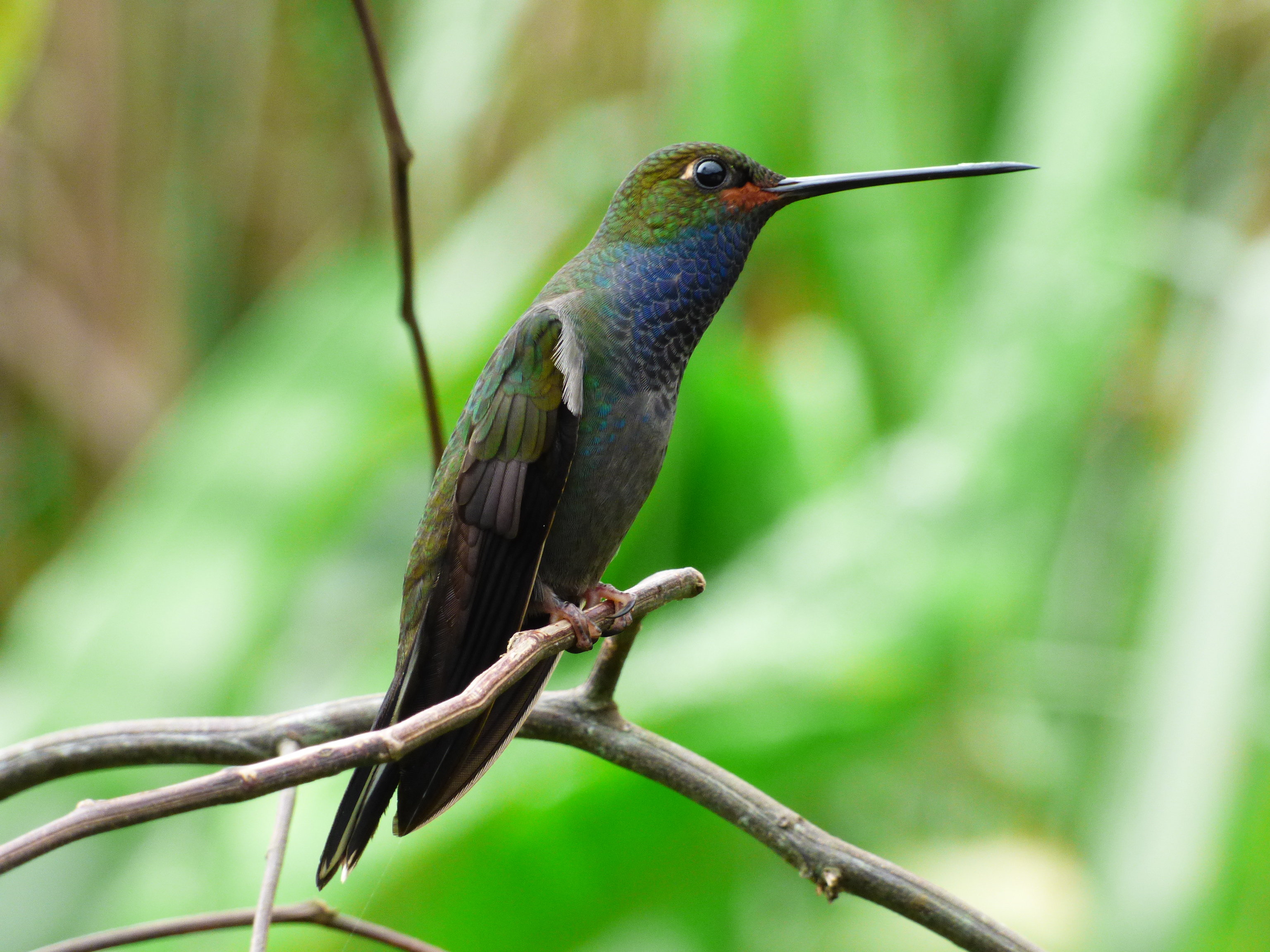 Urochroa bougueri (Colibrí nagüiblanco)